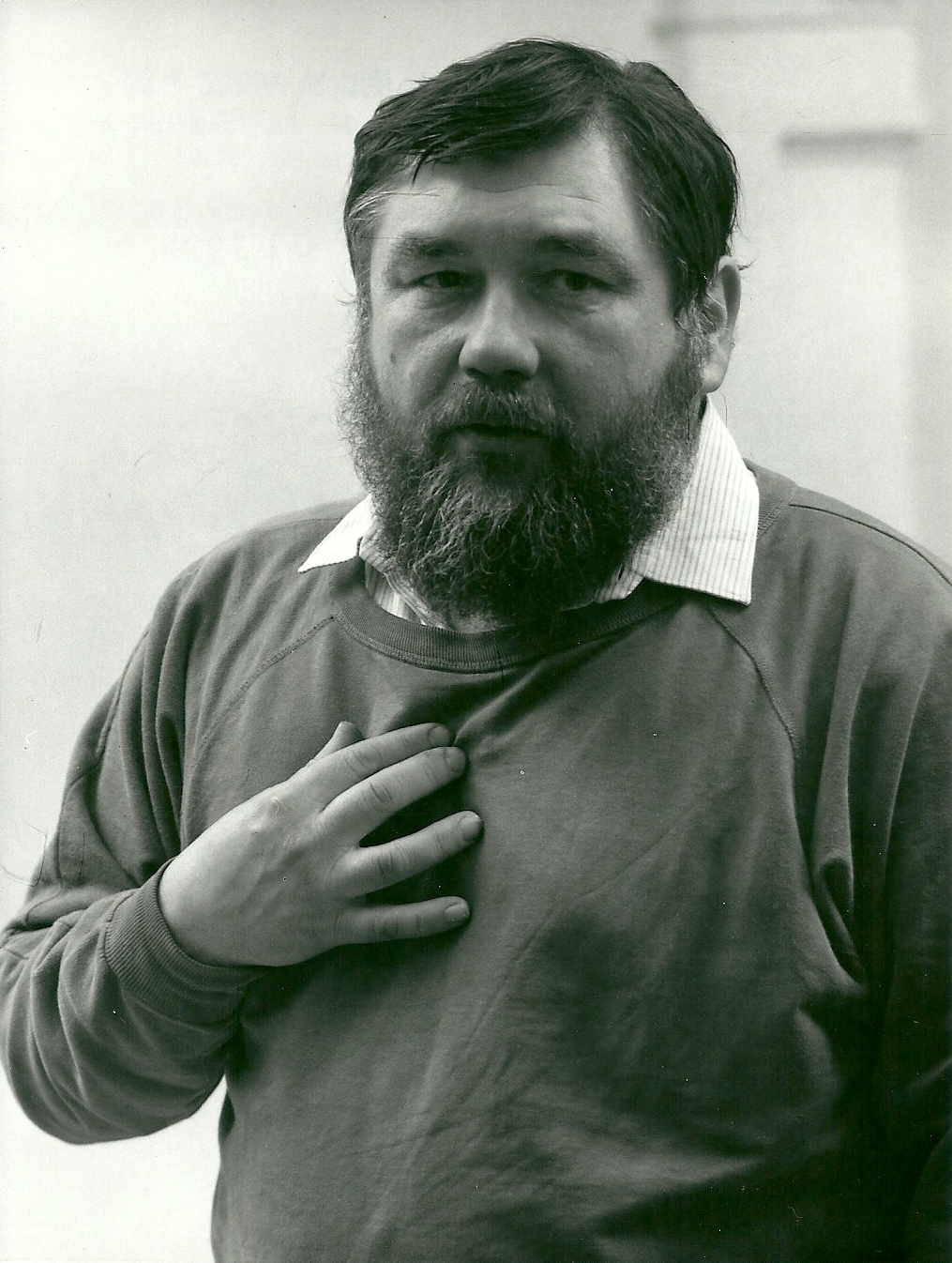 fotografie malíře Jana Součka z vernisáže v Aši